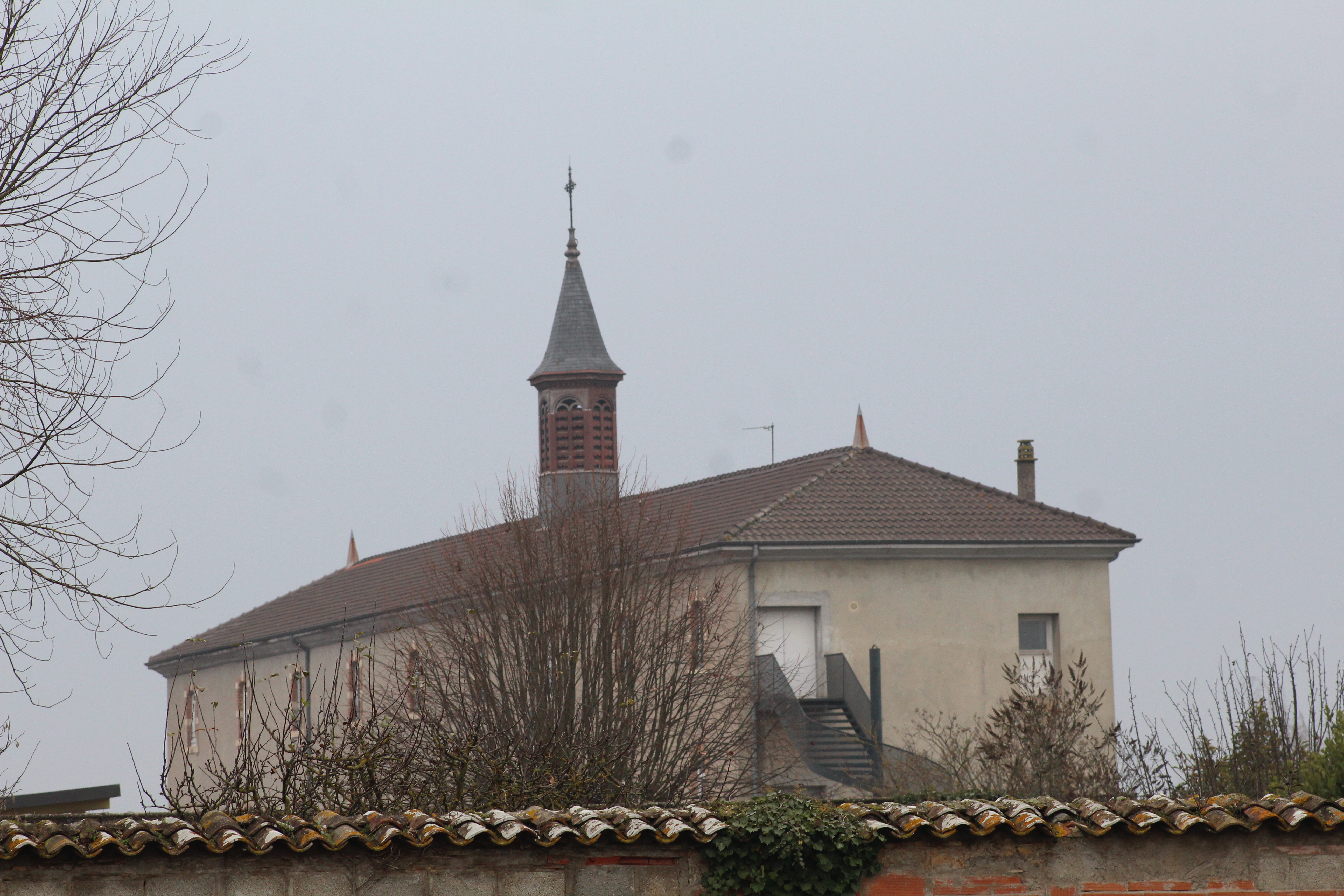 Collège de Saint-Joseph à Saint-Didier-sur-Chalaronne.